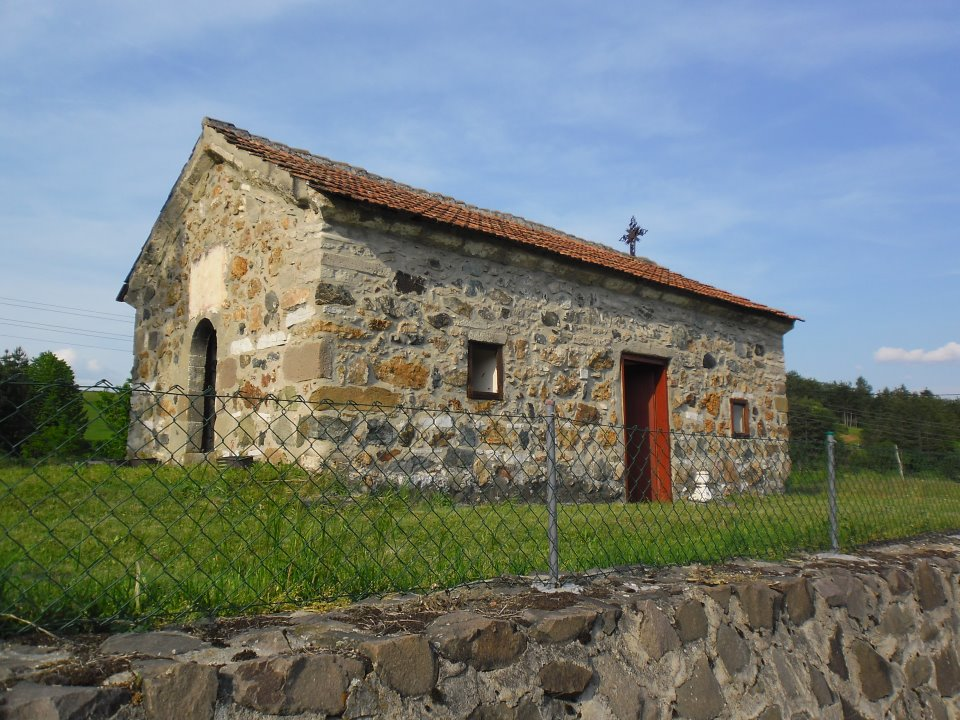 Црква Свете Петке у Трнави.